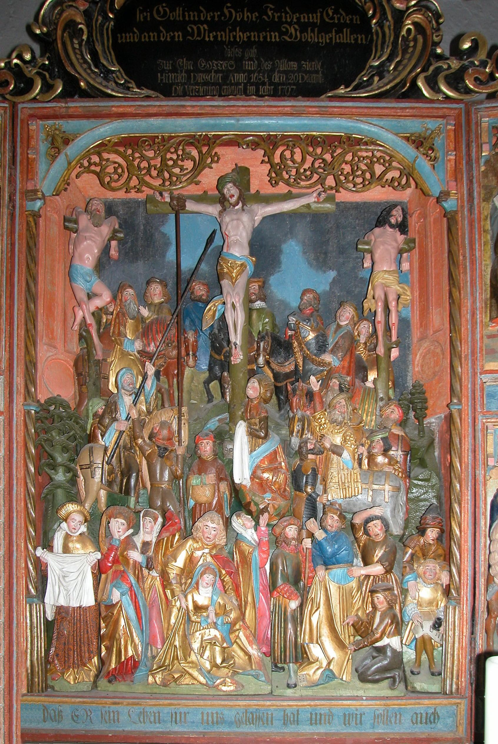 St. Anna, Altar Standort:54°21′7.9″N 8°49′34.3″E / 54.352194°N 8.826194°E